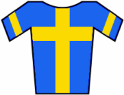 Maillot de Suecia